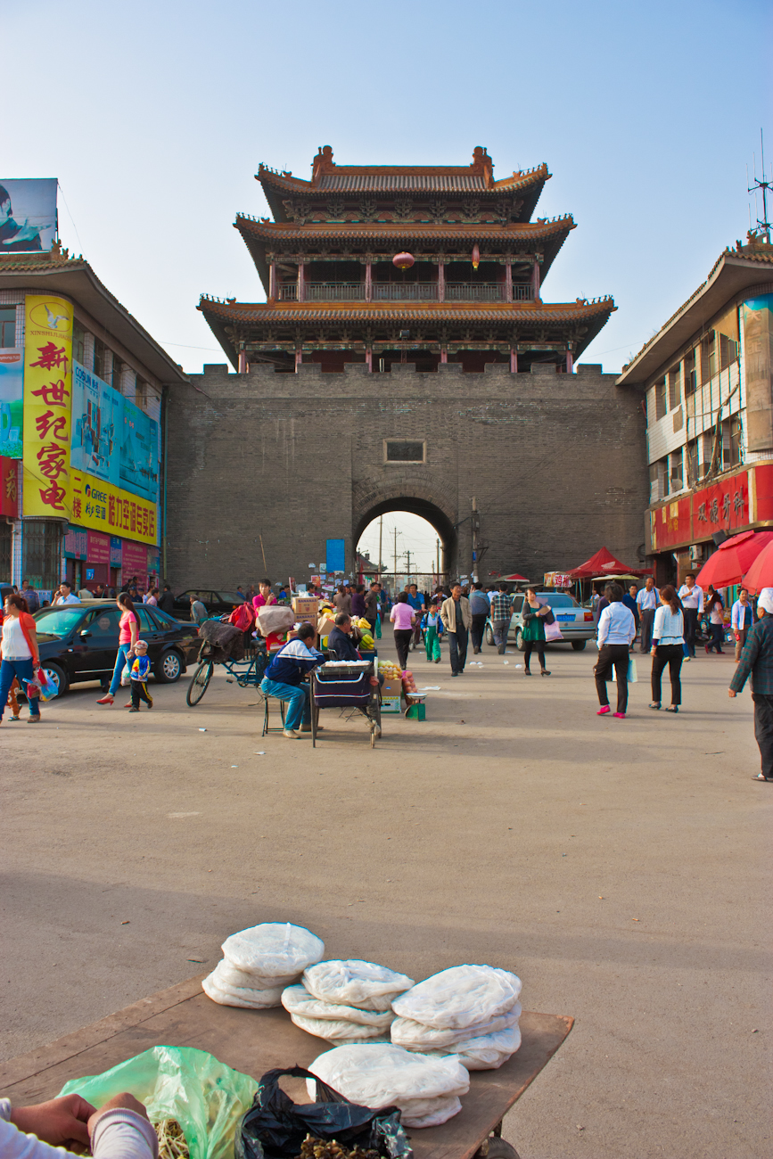 晋北古城门偏关头——2012/05/22